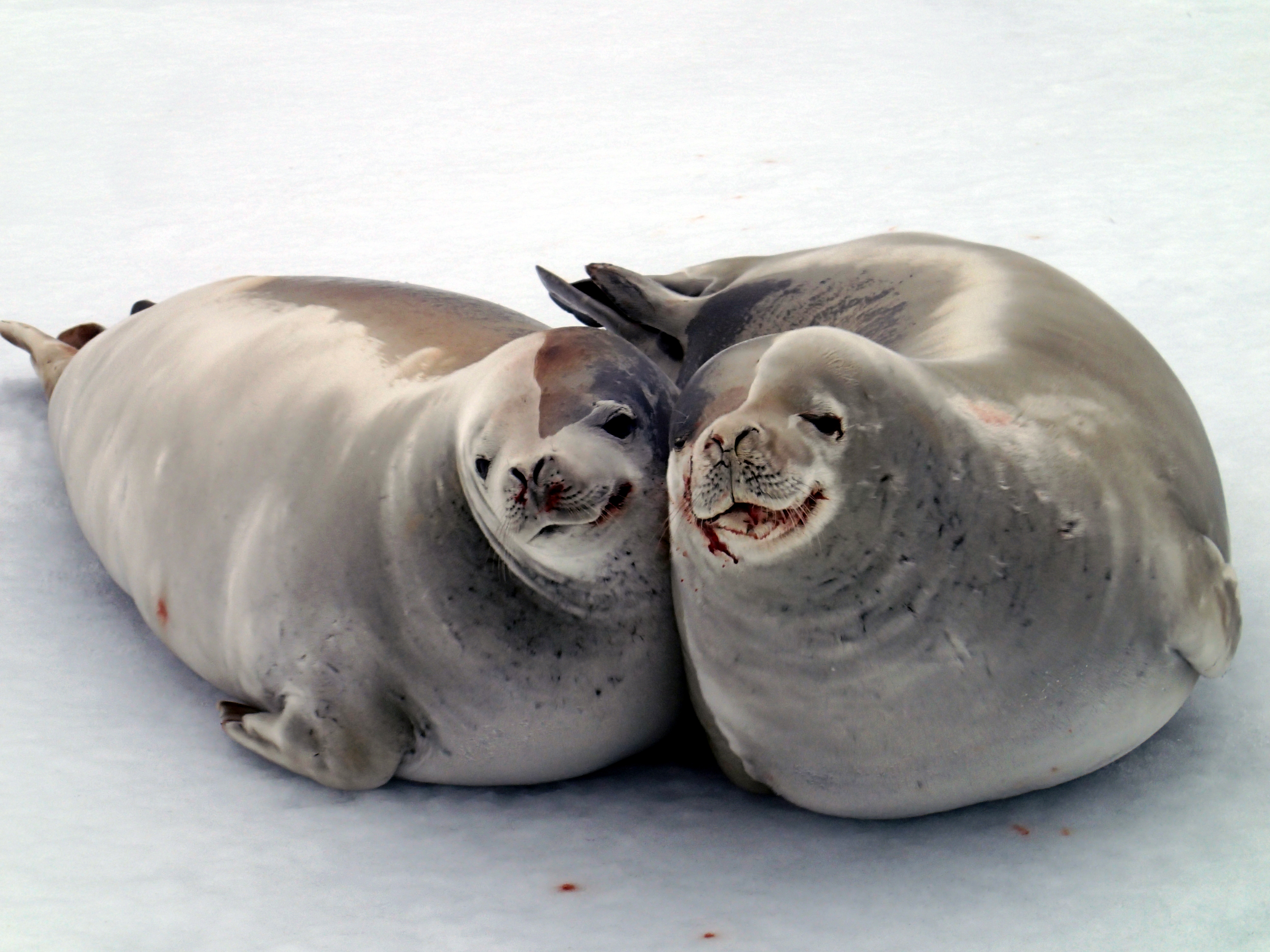 남극 킹조지섬에 위치한 세종과학기지 인근에서 2016년 10월 30일 촬영한 Lobodon carcinophaga (게잡이물범) 사진